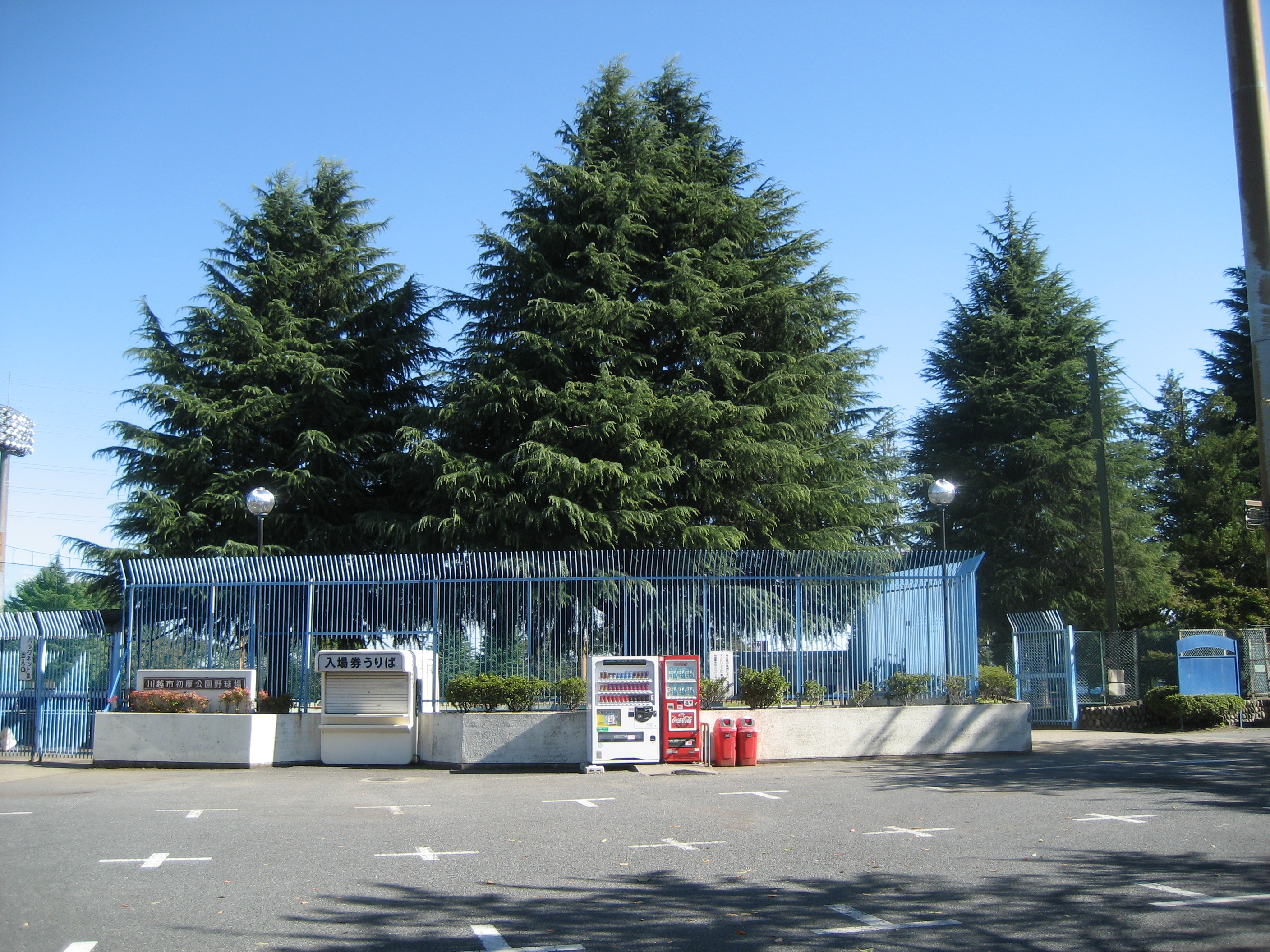 川越市営初雁公園野球場（球場入口付近を撮影）